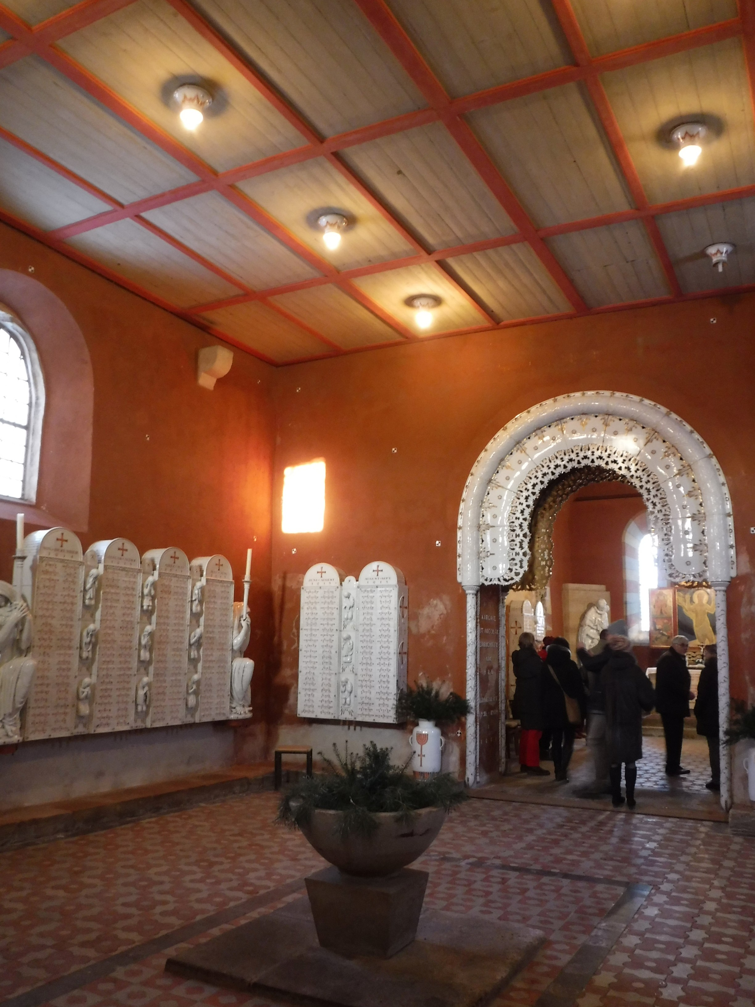 Kirchenschiff der Nikolaikirche in Meißen mit Blick in den Chor